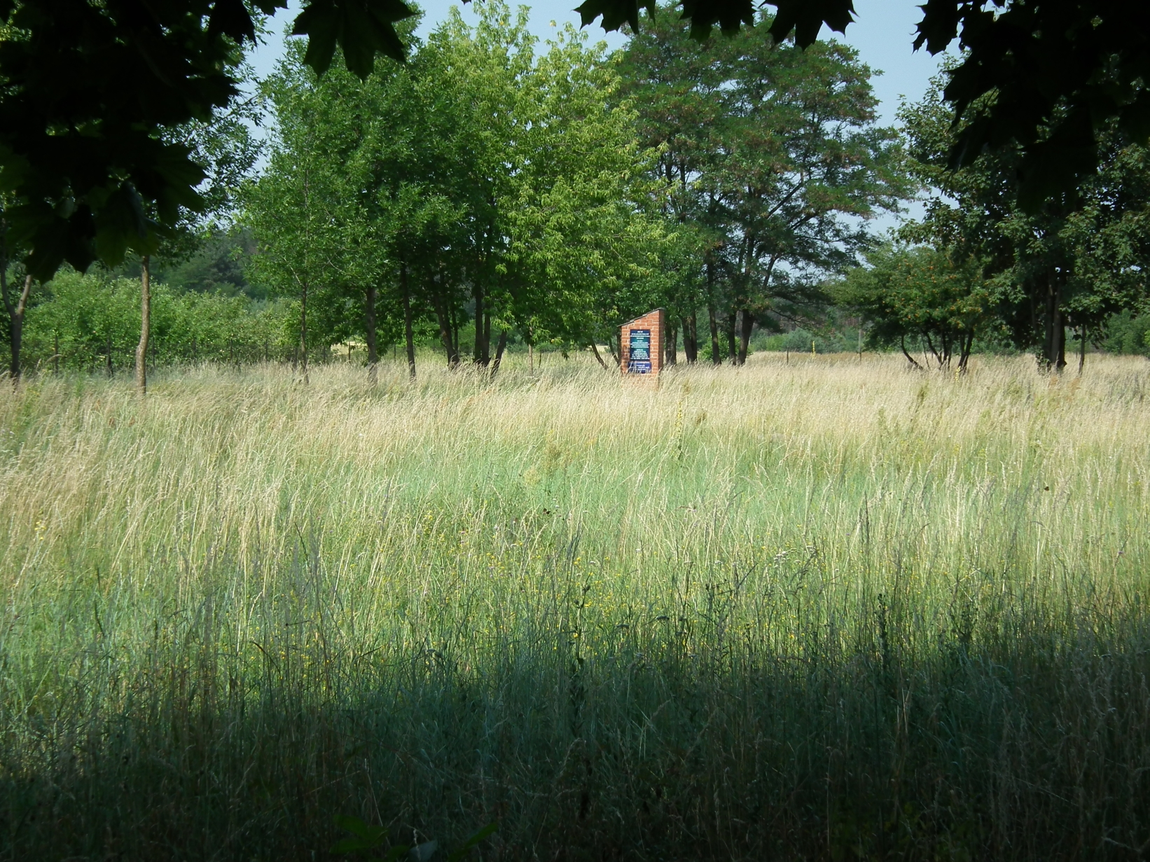 Annopol - Cmentarz żydowski (zabytek nr 408/A z 19.10.1989)